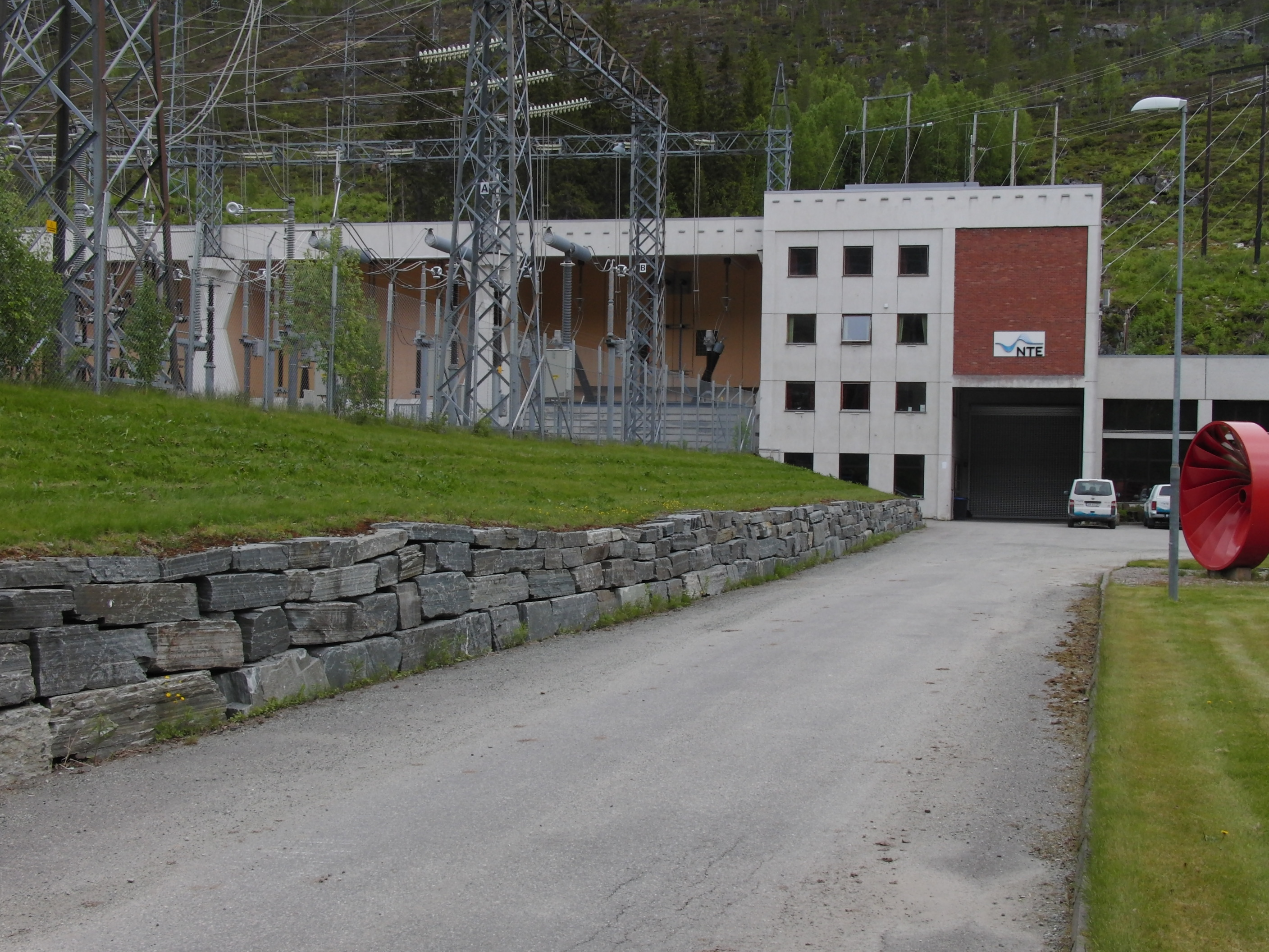 Tunnsjødal kraftverk